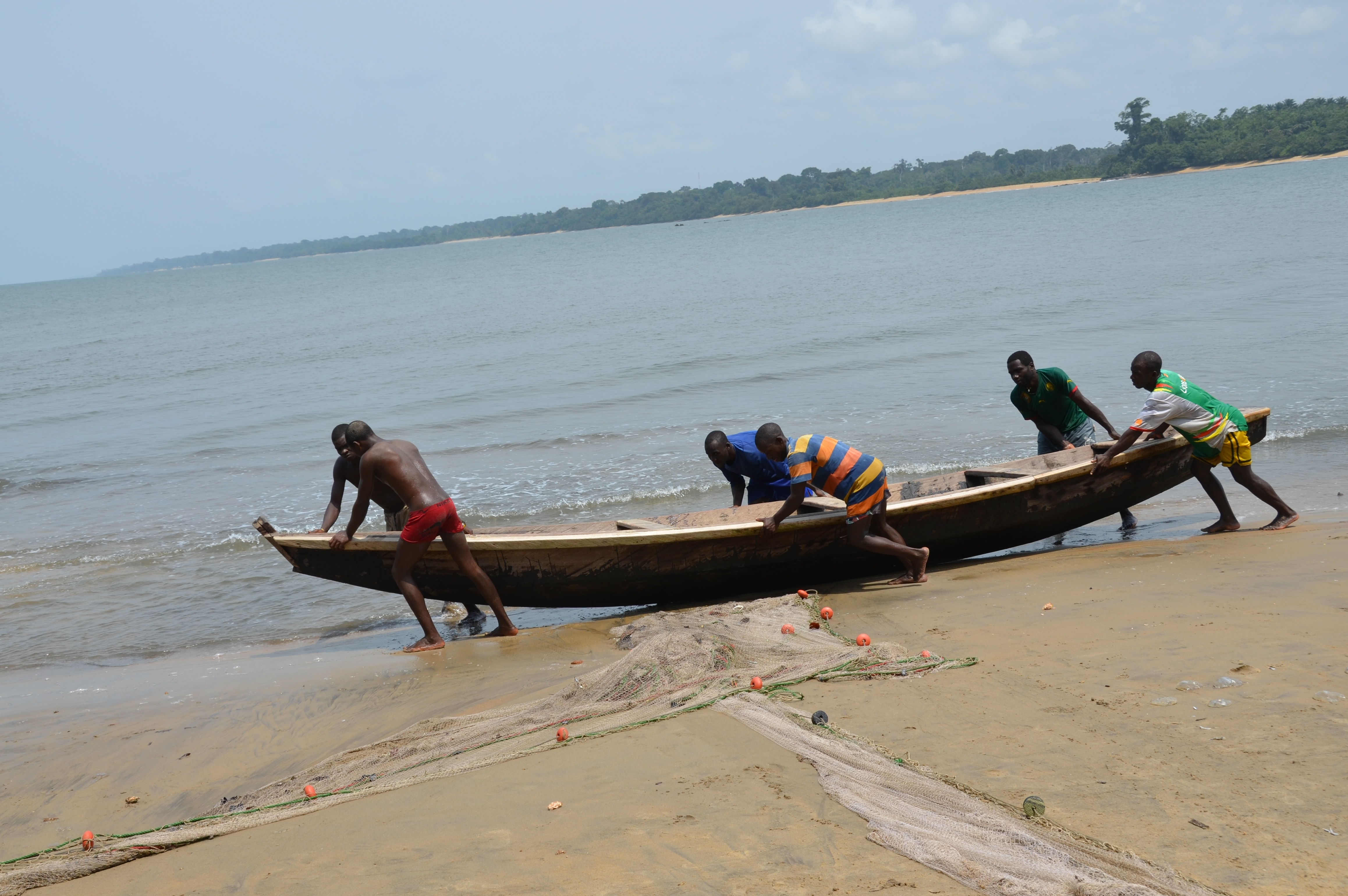 Londji